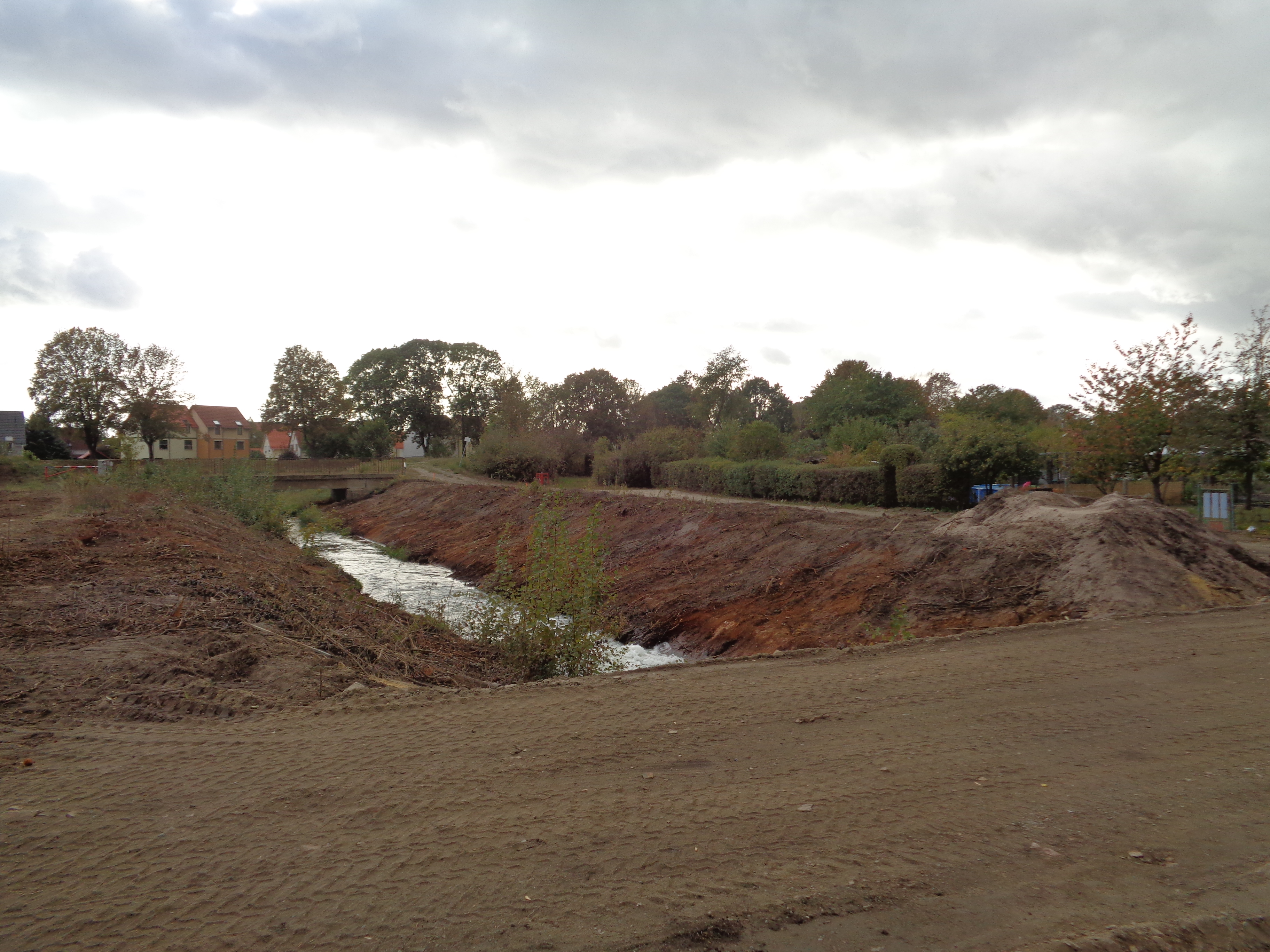 Rainitza im Umbau Senftenberg